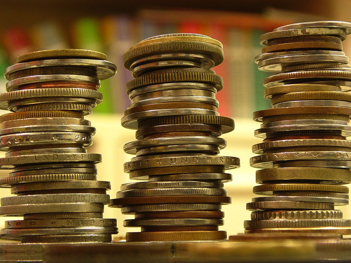 Contando Dinheiro